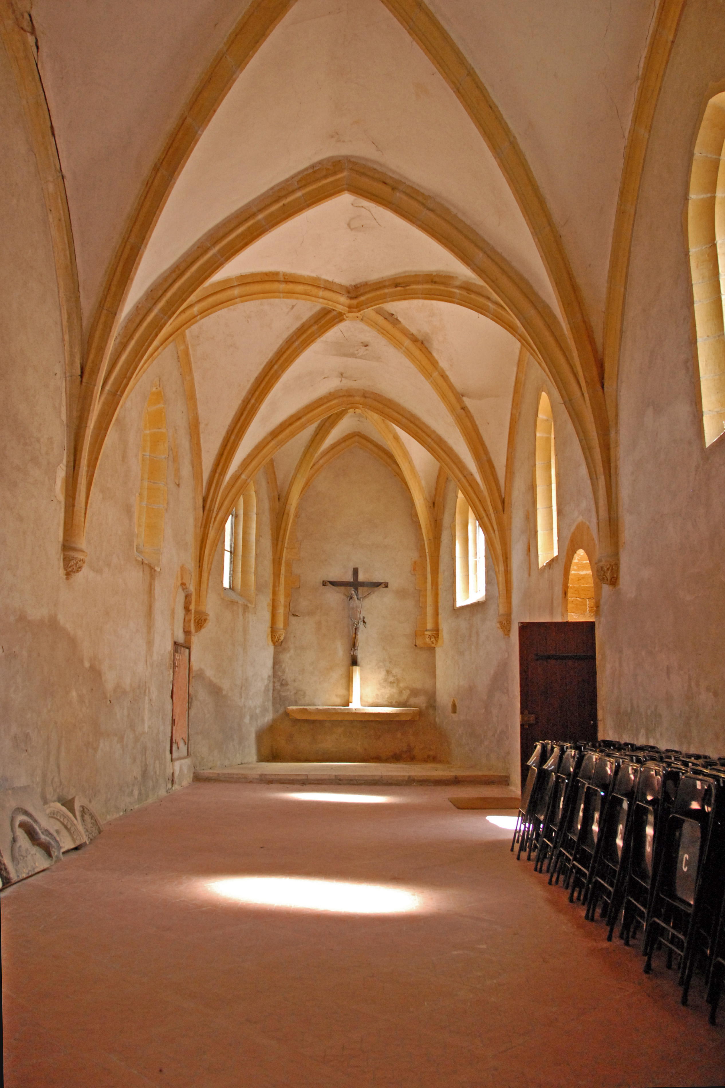 Kapelle aus Kapitelsaal